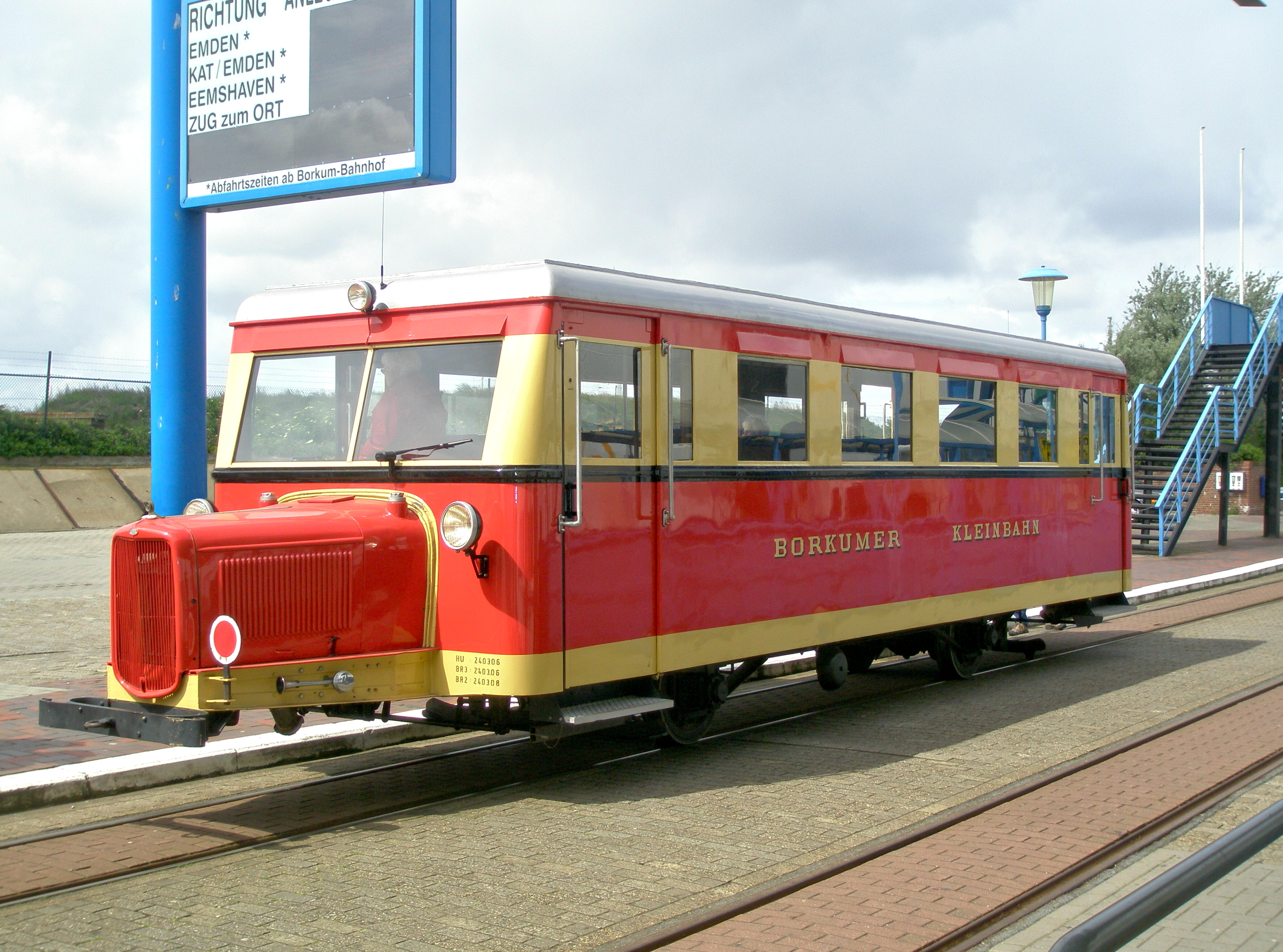 Triebwagen Typ "Wismar" T 1 der Borkumer Kleinbahn am 04.06.2009